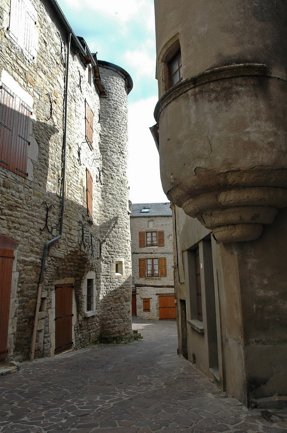 cité de Sévérac-le-Château (Aveyron)